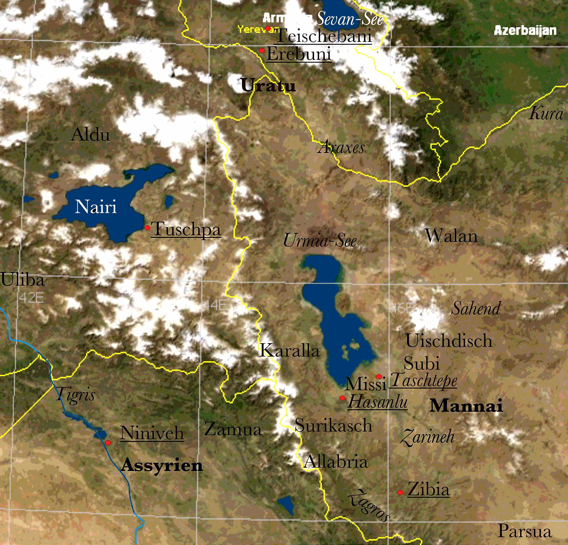 Lake Urmija during 10-7 c. BC